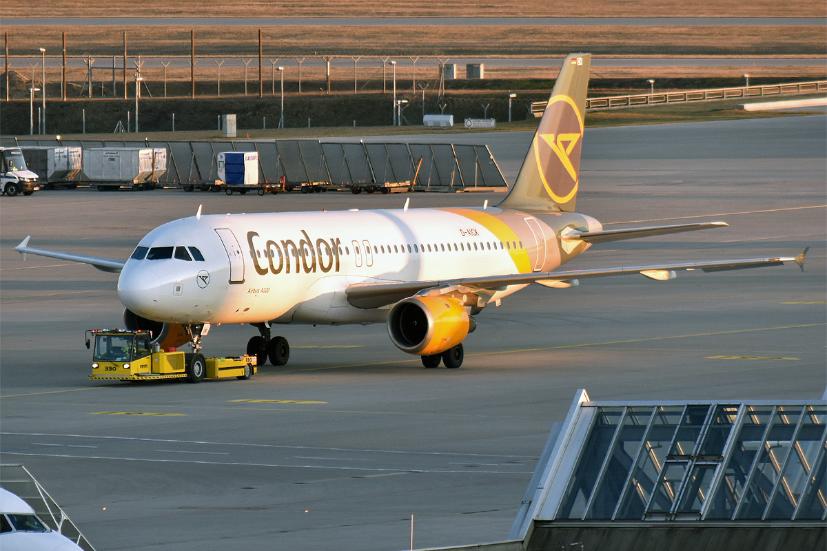 Condor, D-AICK, Airbus A320-212